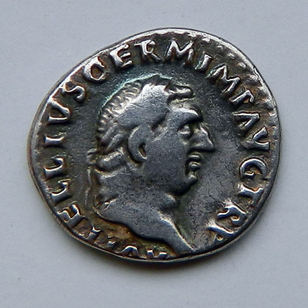 Изображение Вителлия на монете с сайта